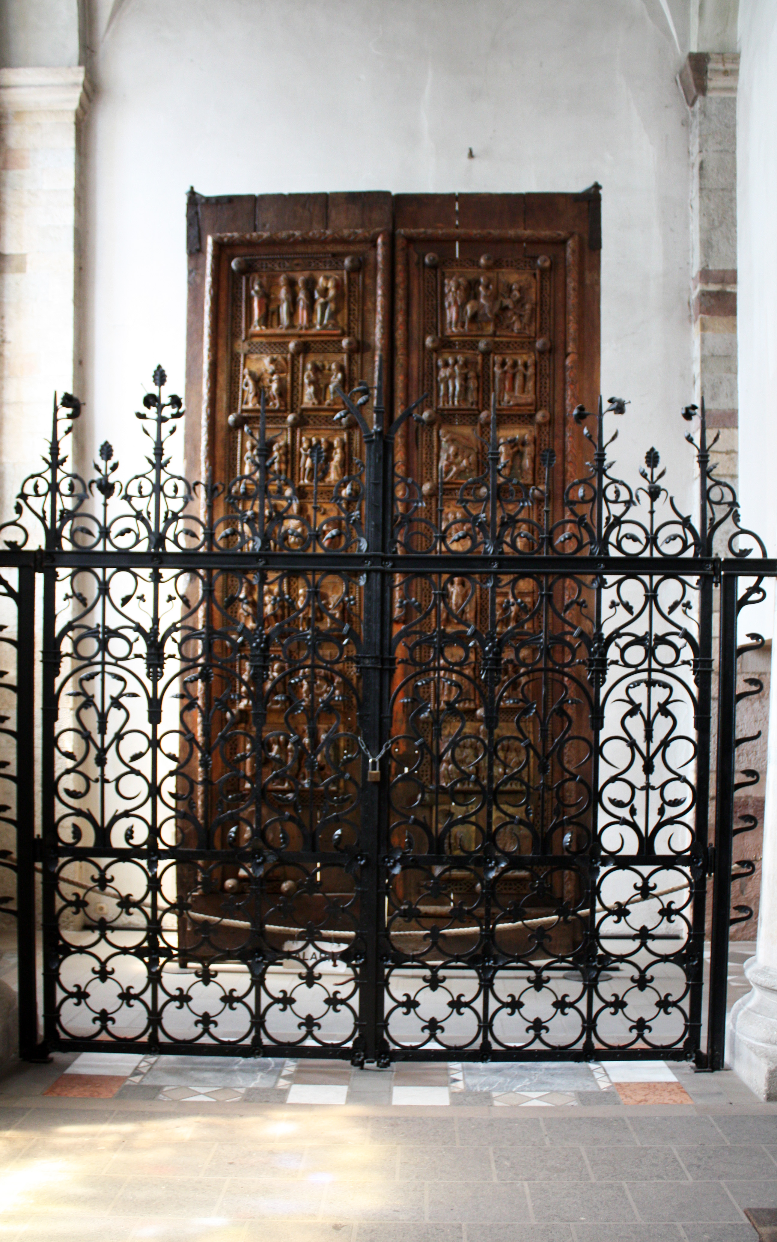 st. Maria im Kapitol, Köln. Altes romanisches Portal der nördlichen Konche. Köln, Mitte des 11. Jahrhunderts Eichenbohlen mit ursprünglich 26 Relieffeldern verziert. Geschnitzte Rahmenleisten aus Nussbaumholz. Höhe 4,85 m, Breite beider Flügel 2,48 m Die Tür soll die letzte erhaltene, mit Bildschnitzereien versehene Holztüre des Mittelalters sein.